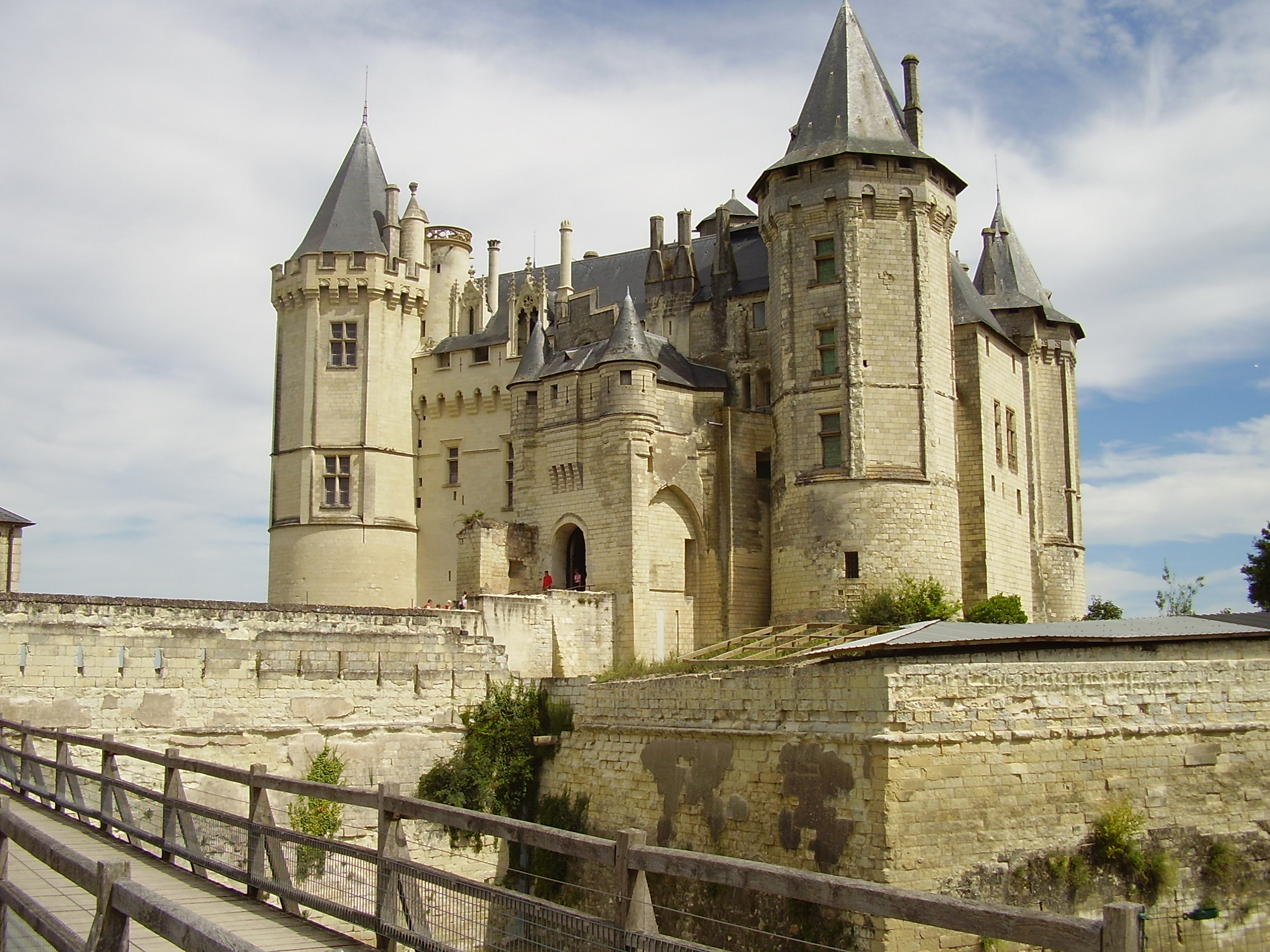 Château de Saumur, Frankreich